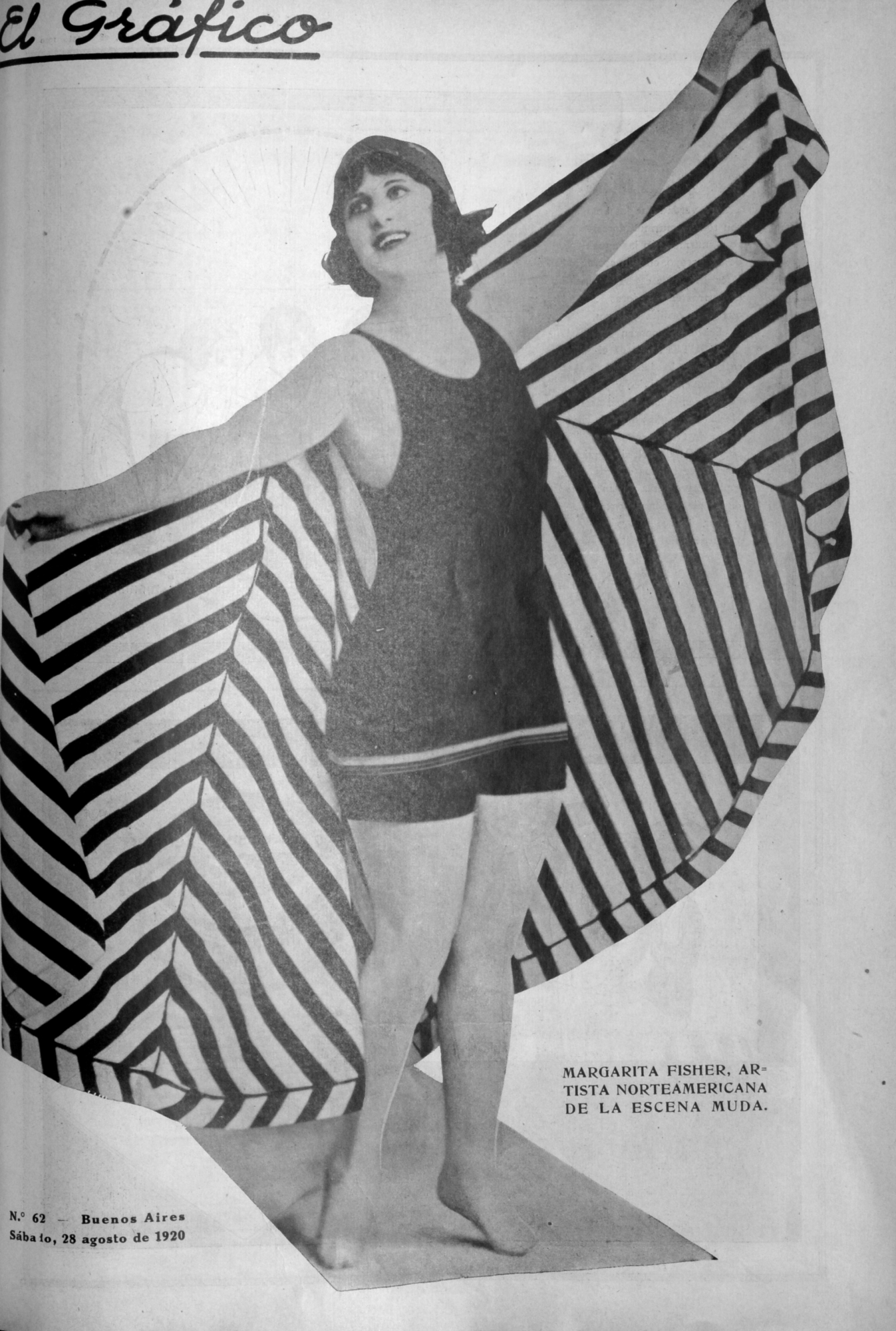 El Grafico del 28 de Agosto de 1920. Edicion 62